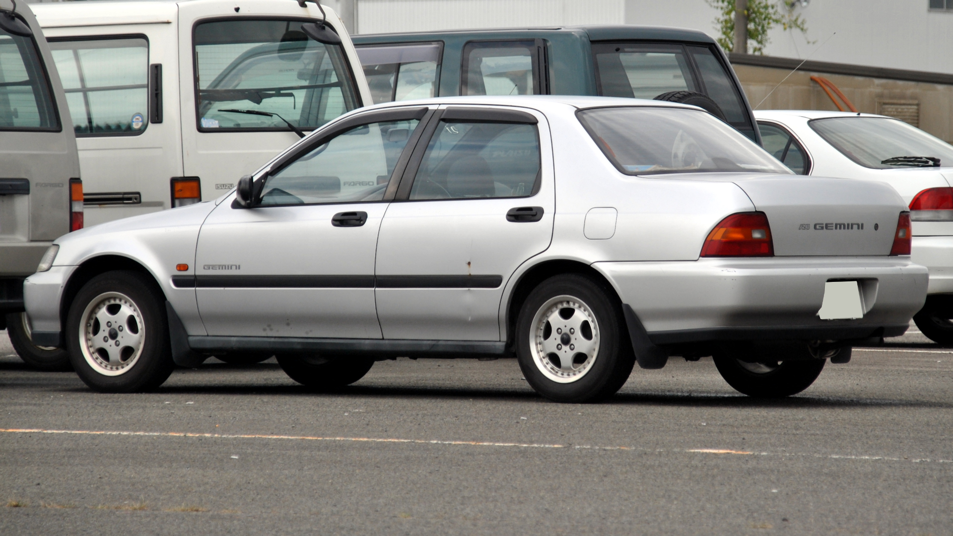 いすゞ・ジェミニ（4代目）